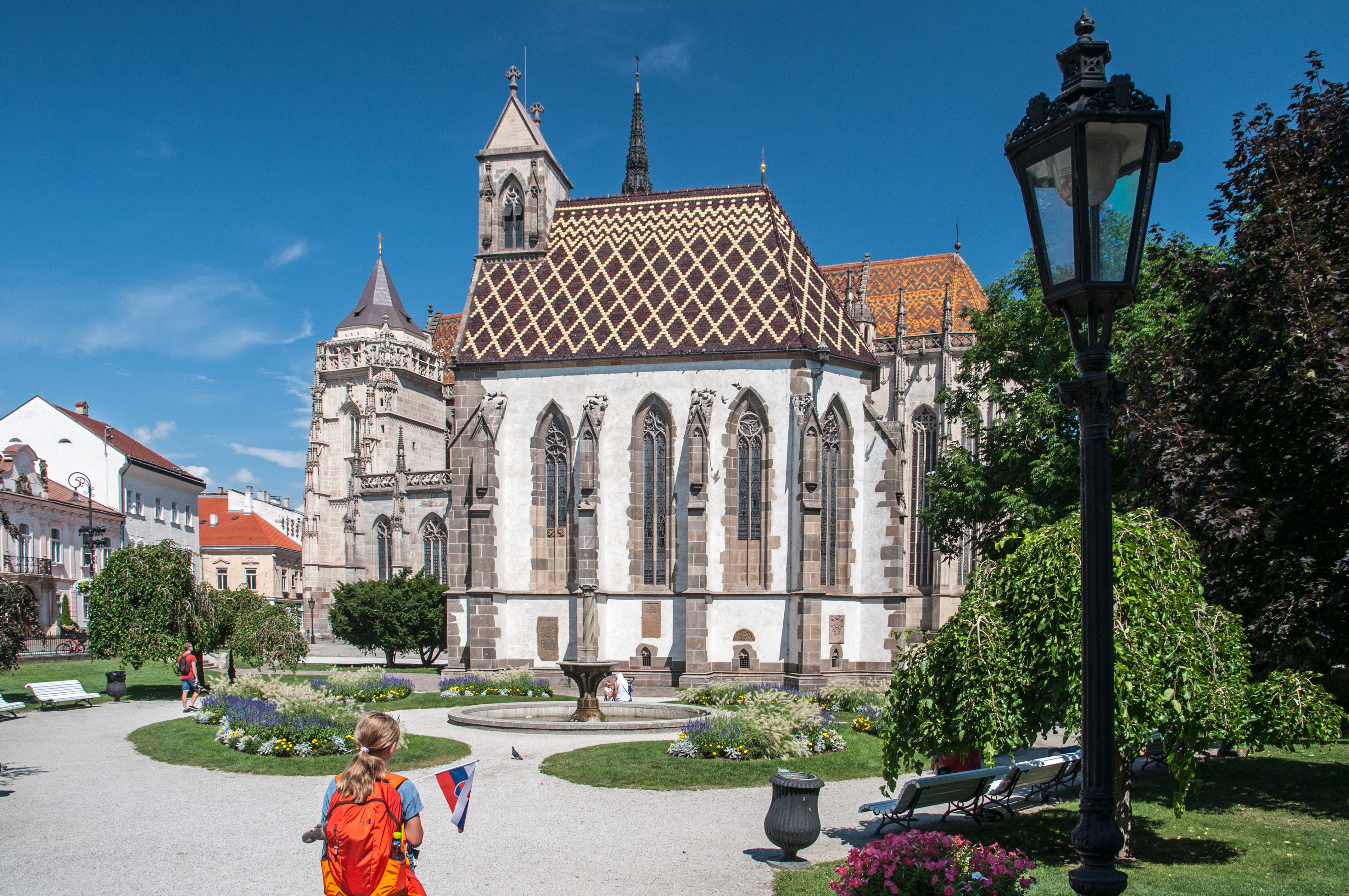 Kaplnka svätého Michala